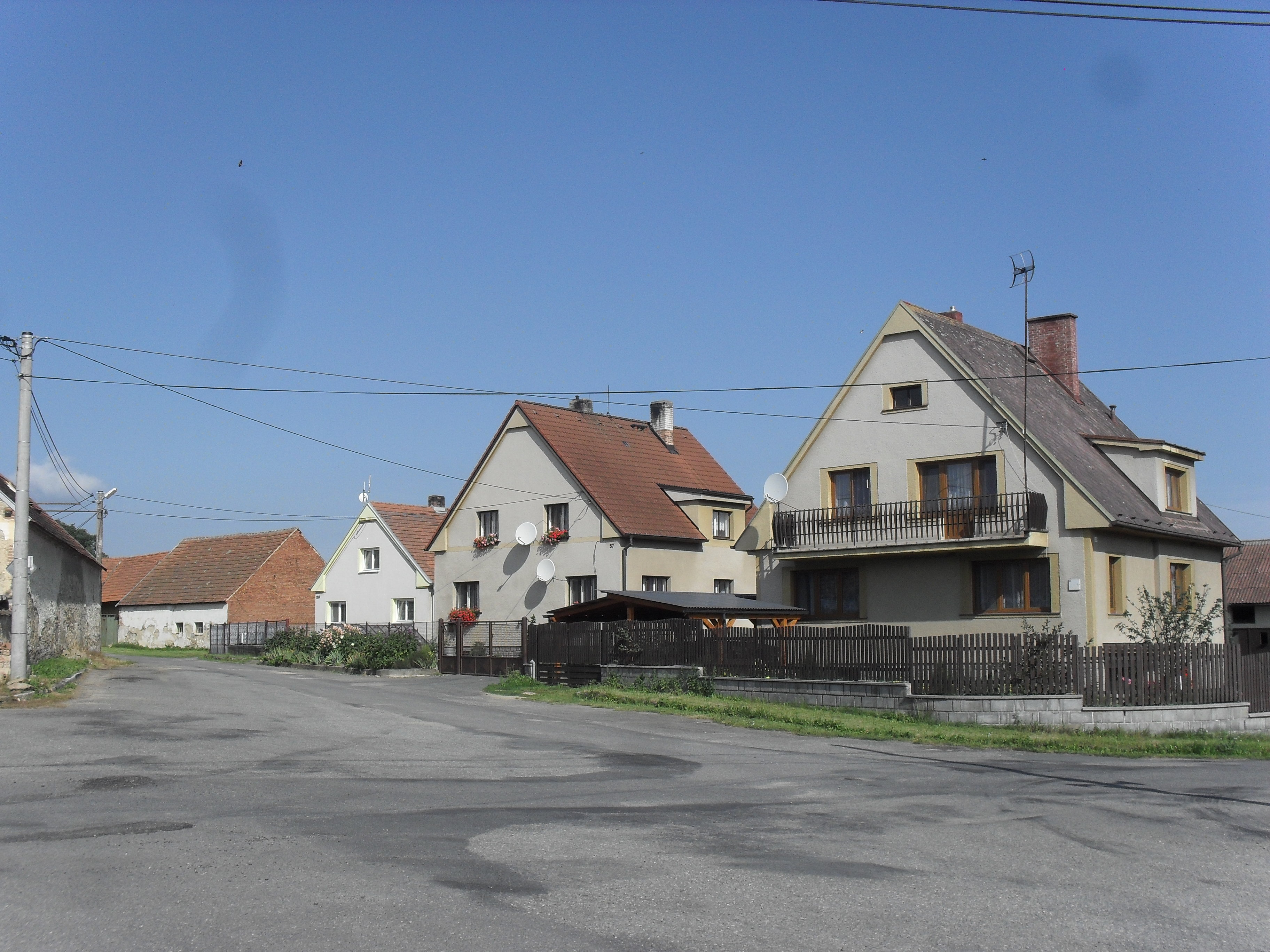 Fotografie pořízena v obci Jetenovice.